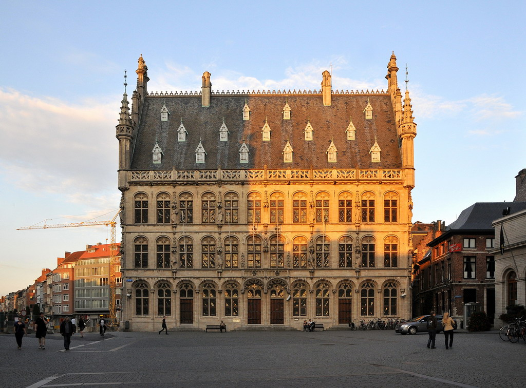 Het Tafelrond is een gotisch gebouw op de Grote Markt in Leuven, dat gebouwd werd tussen 1480 en 1487 en afgebroken in 1818. Na de Eerste Wereldoorlog werd het heropgebouwd. Tot 2002 was de Nationale Bank er gevestigd. Het werd gebouwd naar een ontwerp van Matthijs de Layens.